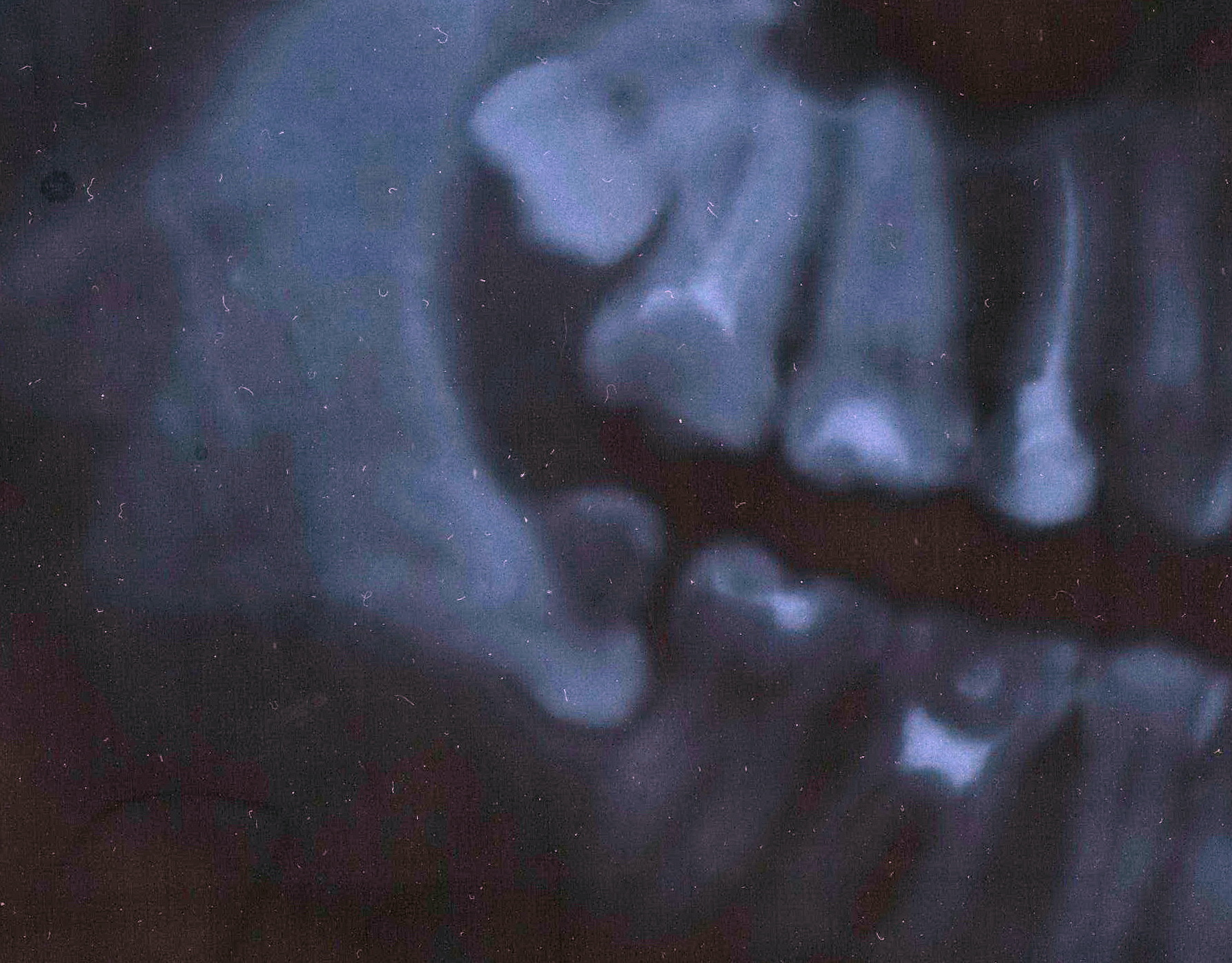 Снимок дистопированного зуба мудрости с медиальным погружением.